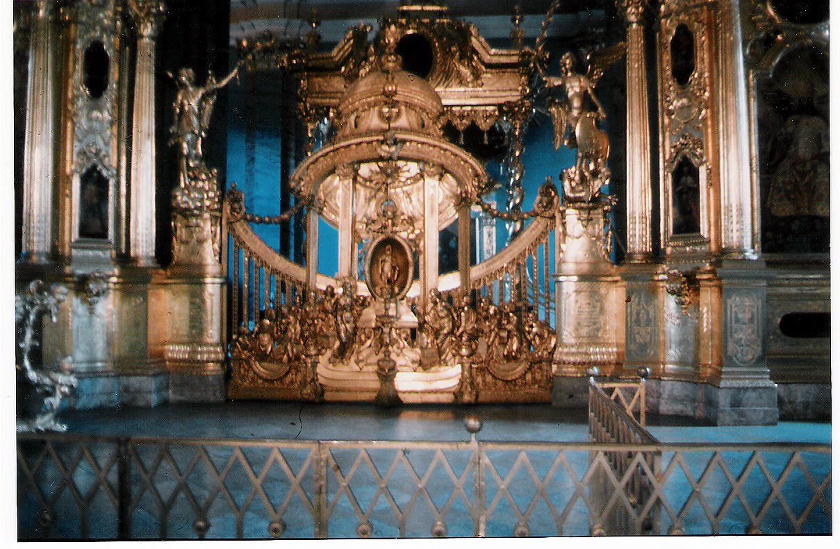 Pietari-Paavalin linnoituksen kirkon ikonostaasi